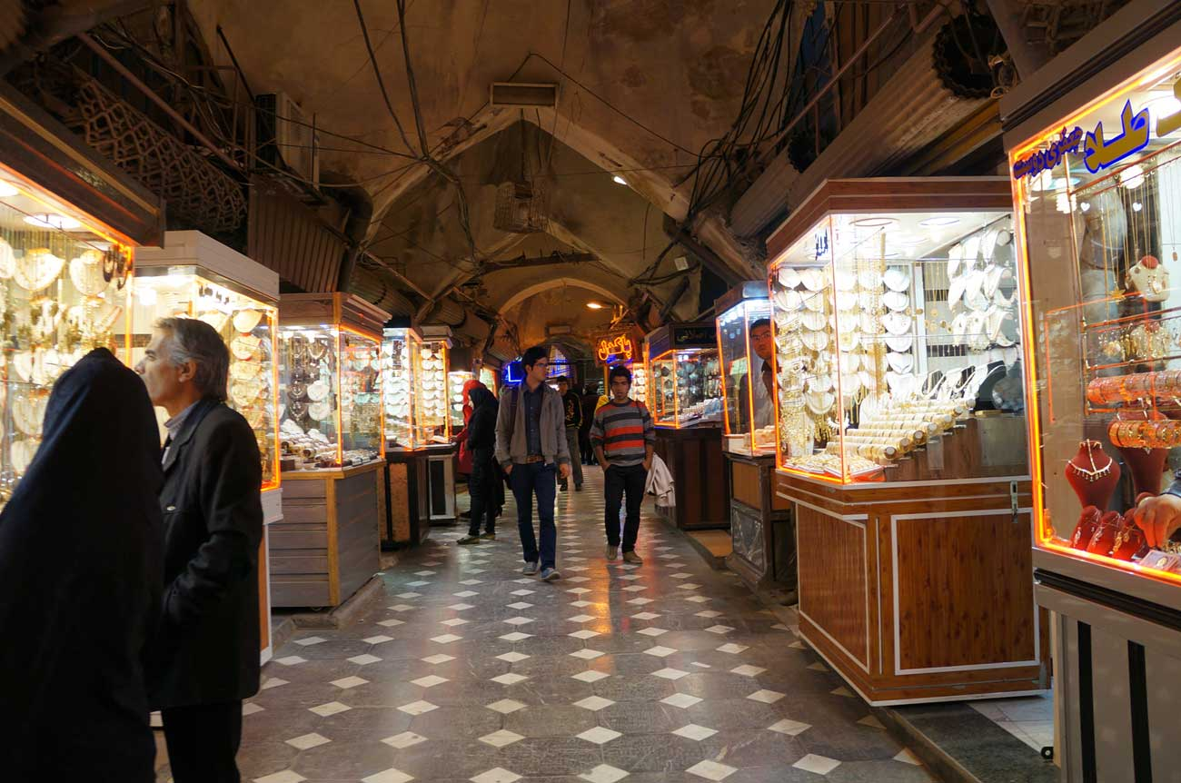 Ardabil, Iran 2013